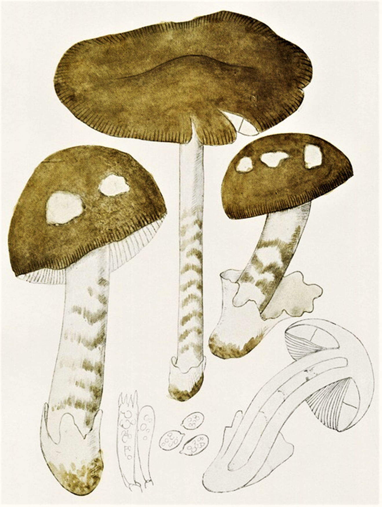 Bres.: Amanita strangulata Fr. (1838), heute Amanita ceciliae (Berk. & Broome, 1854) Bas (1984)